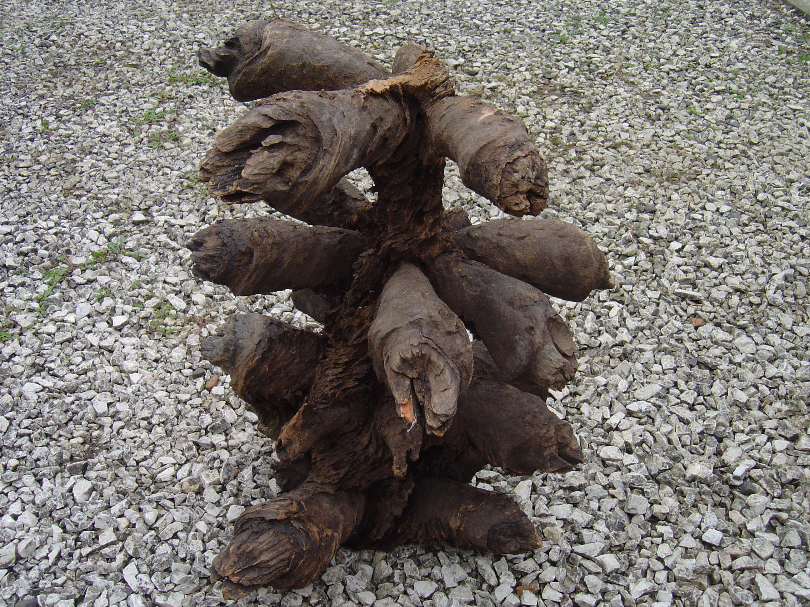 nó de pinho - coroa